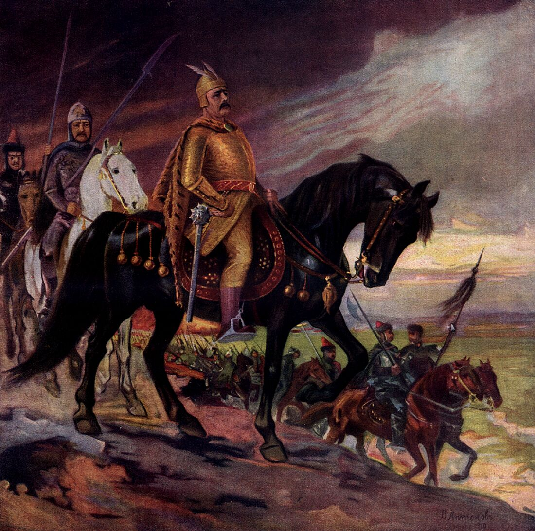 Khan Krum